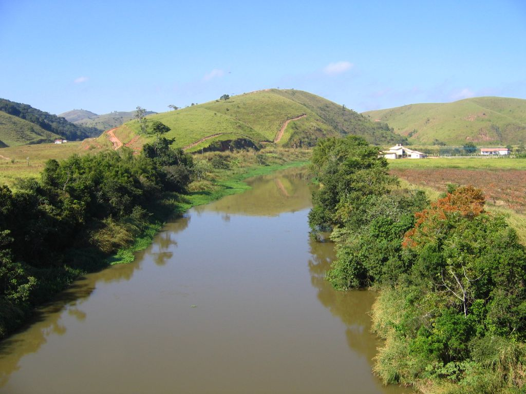 Rio Paraíba do Sul